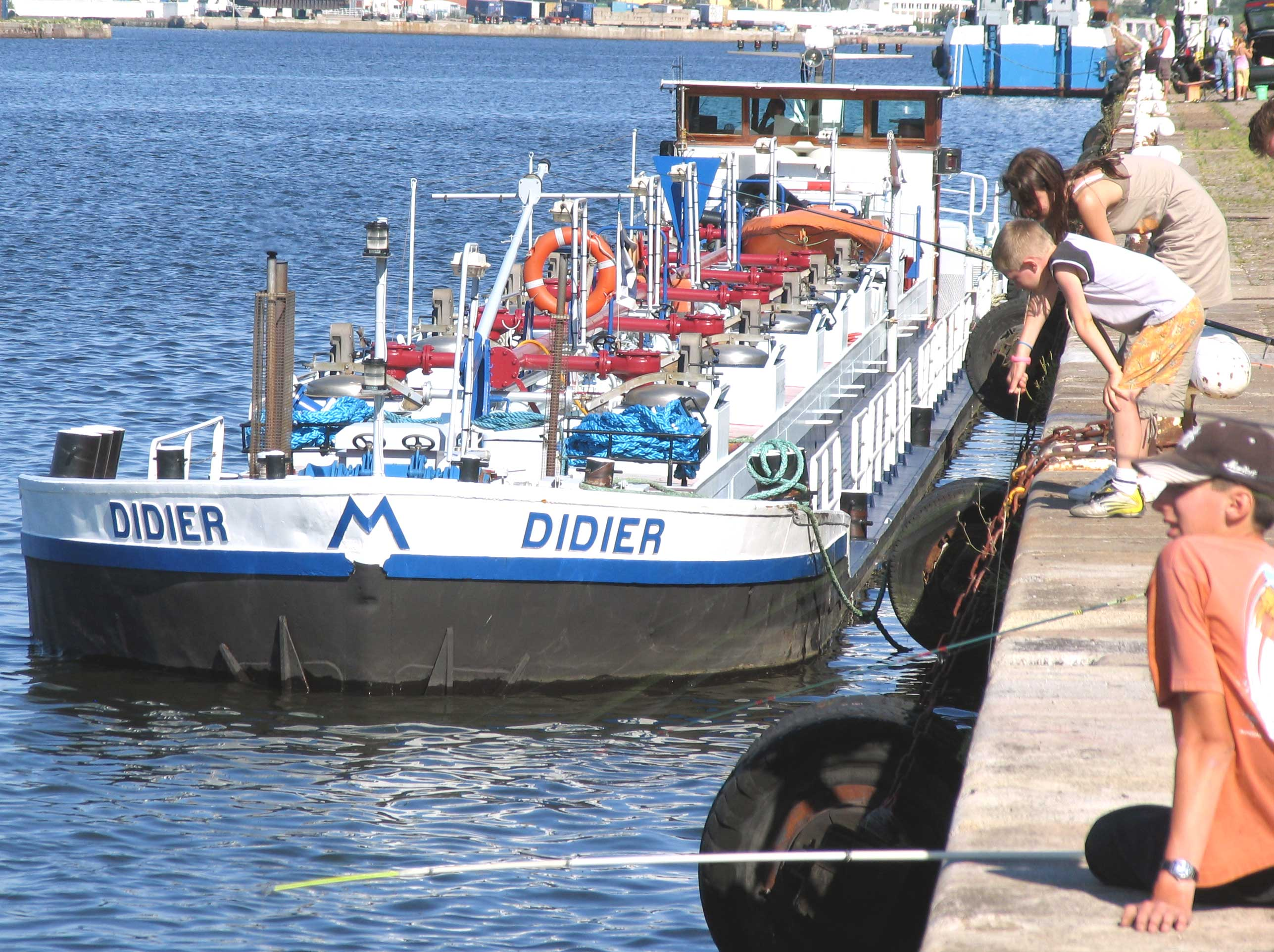 Description : Automoteur DIDIER de la société Mahieu (groupe CFT) dans le port du Havre Lieu : Le Havre, France Date : 2006 Author : Pline photo ou réalisation (schéma) personnelle